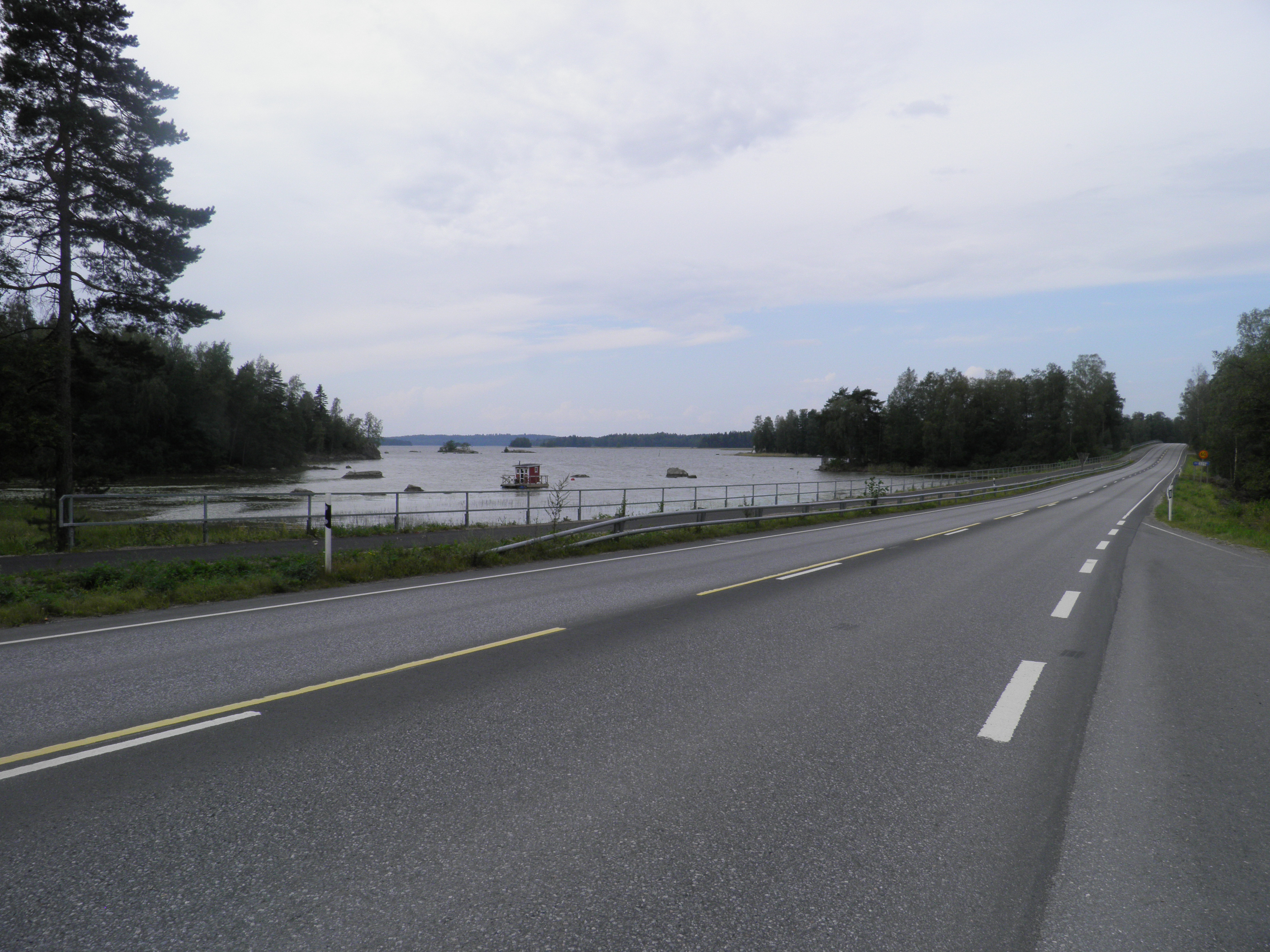 Seututie 325 Kangasalan Pelisalmessa.